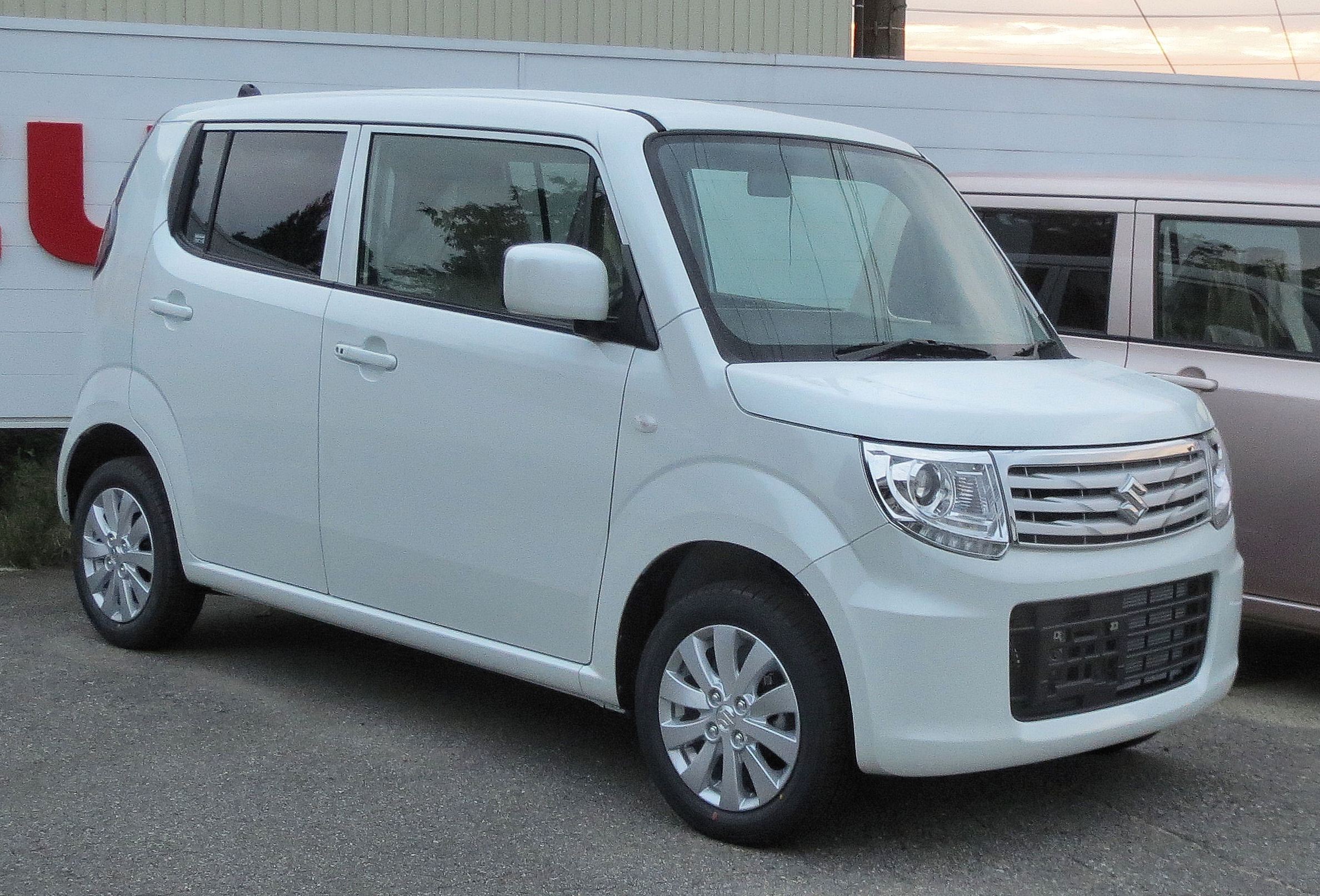 スズキ MRワゴン Wit LS